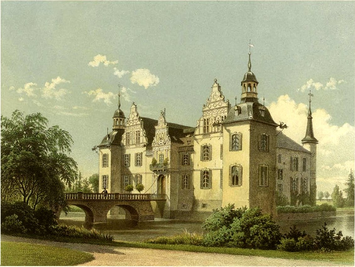 Schloss Frens, Kreis Bergheim, Lithografie aus dem 19. Jahrhundert